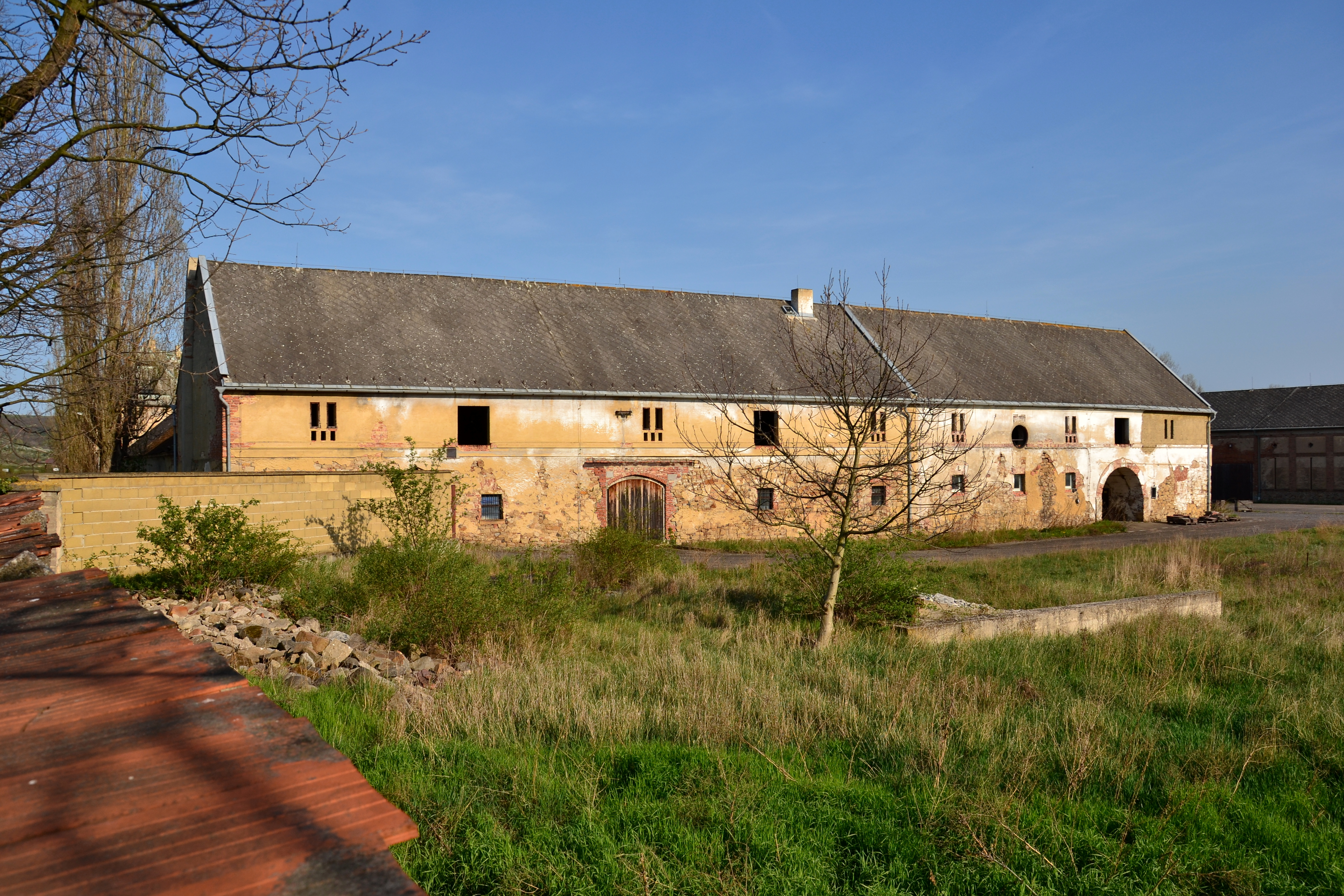 Vičice – západní strana hospodářské budovy na západní straně zámeckého dvora